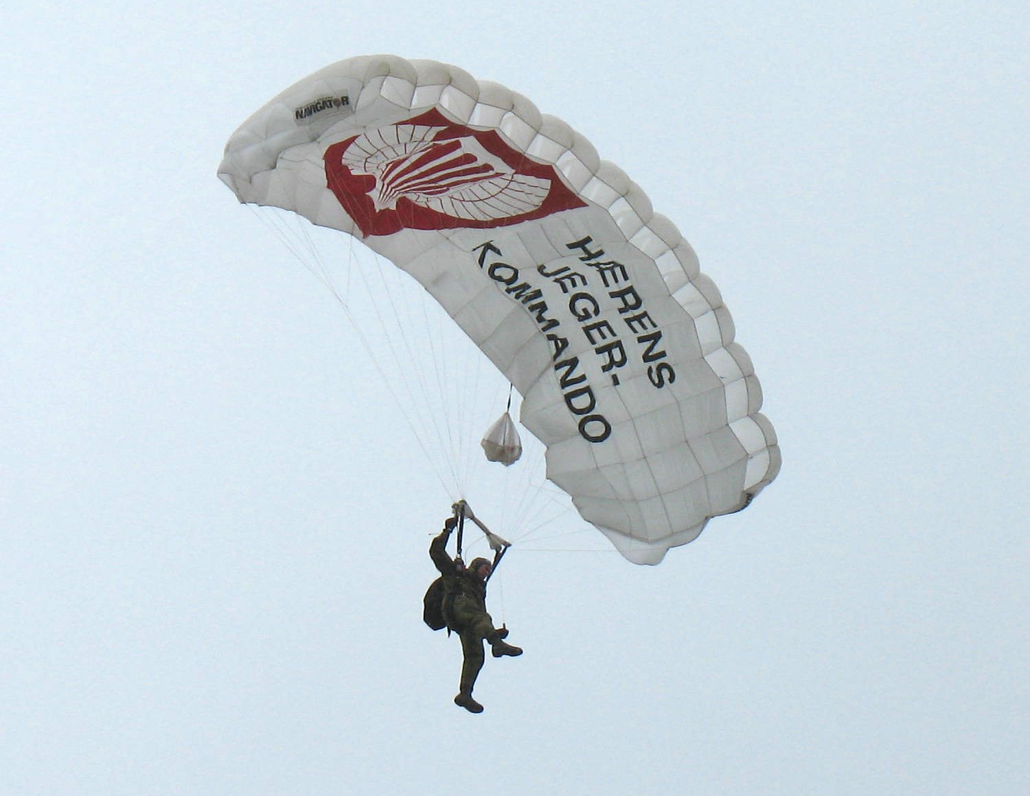 En fallskjermjeger i Hærens jegerkommando